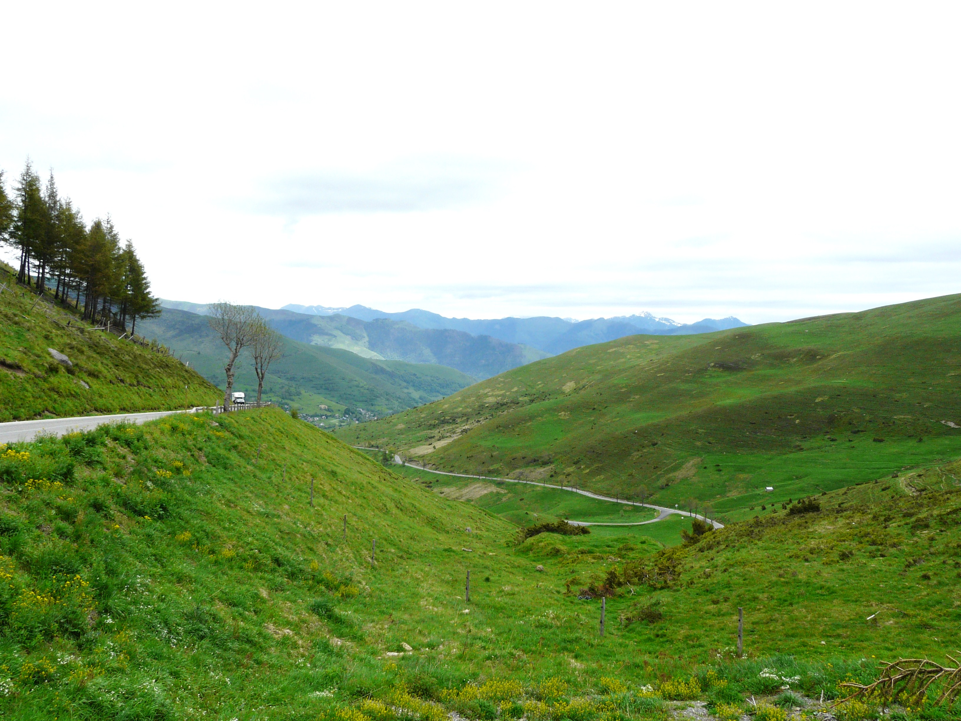 Le versant est du col de Peyresourde, communes de Portet-de-Luchon et Garin, Haute-Garonne, France.